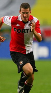 Luigi Bruins Feyenoord